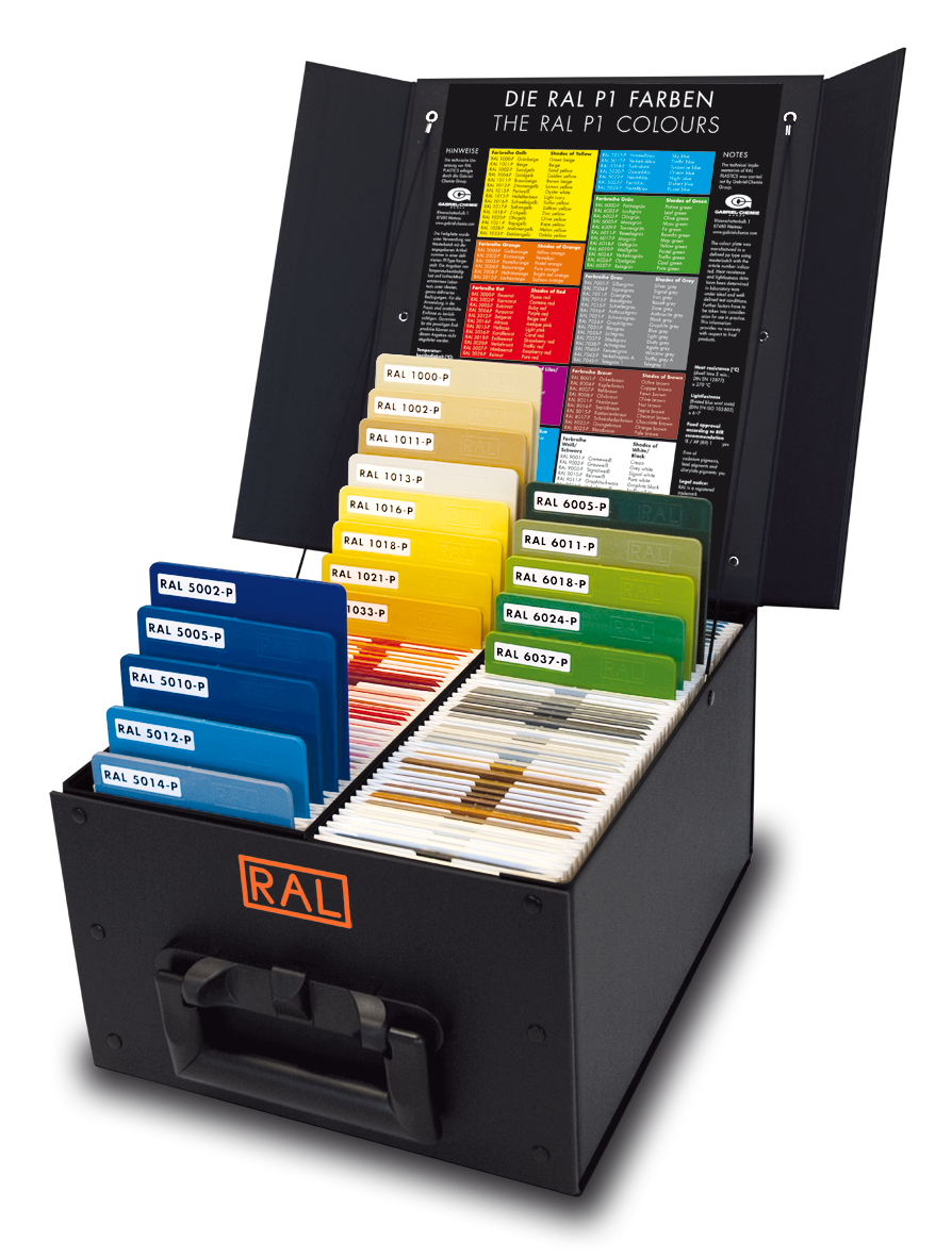 Der RAL Farbstandard für Kunststoffe.